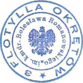 Godło 3. Flotylli Okrętów